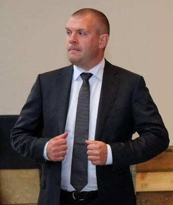 Finansminister Bjarne Corydon under besøg på JP Group i Viborg.